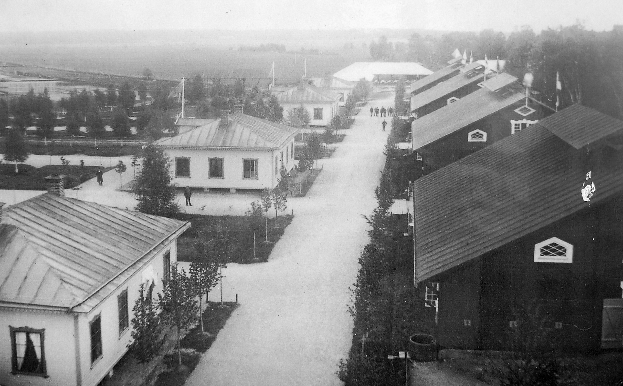 Huvudgatan i Trossnäs, till höger ligger de fyra beväringsbarackerna och till vänster officersbygnaderna.